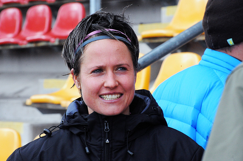 Kathleen Radtke (2014)